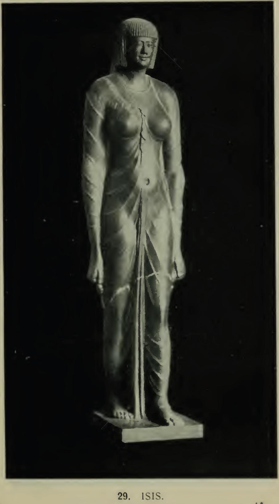 Isis